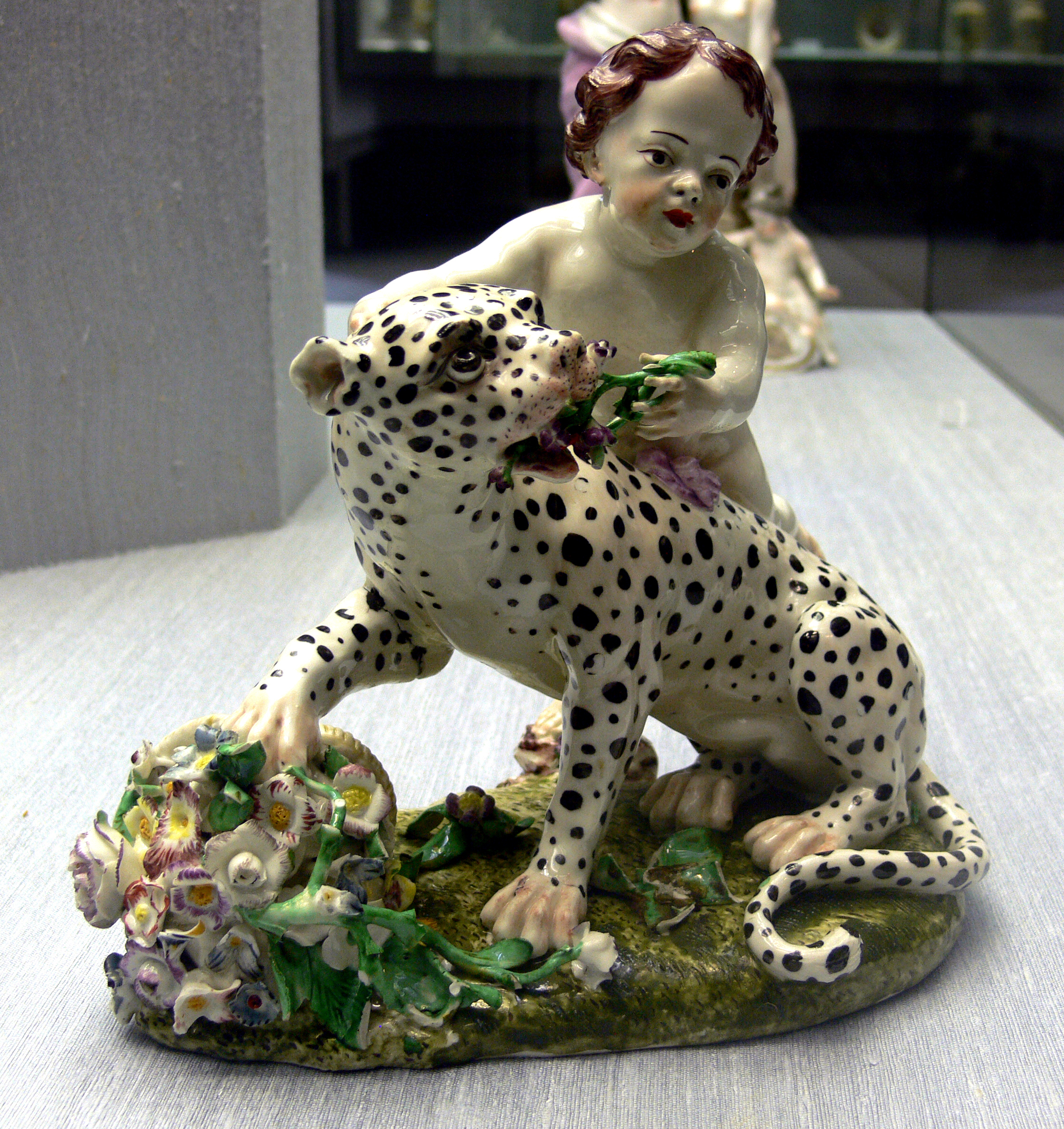 Johann Wilhelm Lanz: Putto mit Panther, Porzellan, Frankenthal 1755/1756 Kunstgewerbemuseum Berlin, Inv. Nr. Lg 237